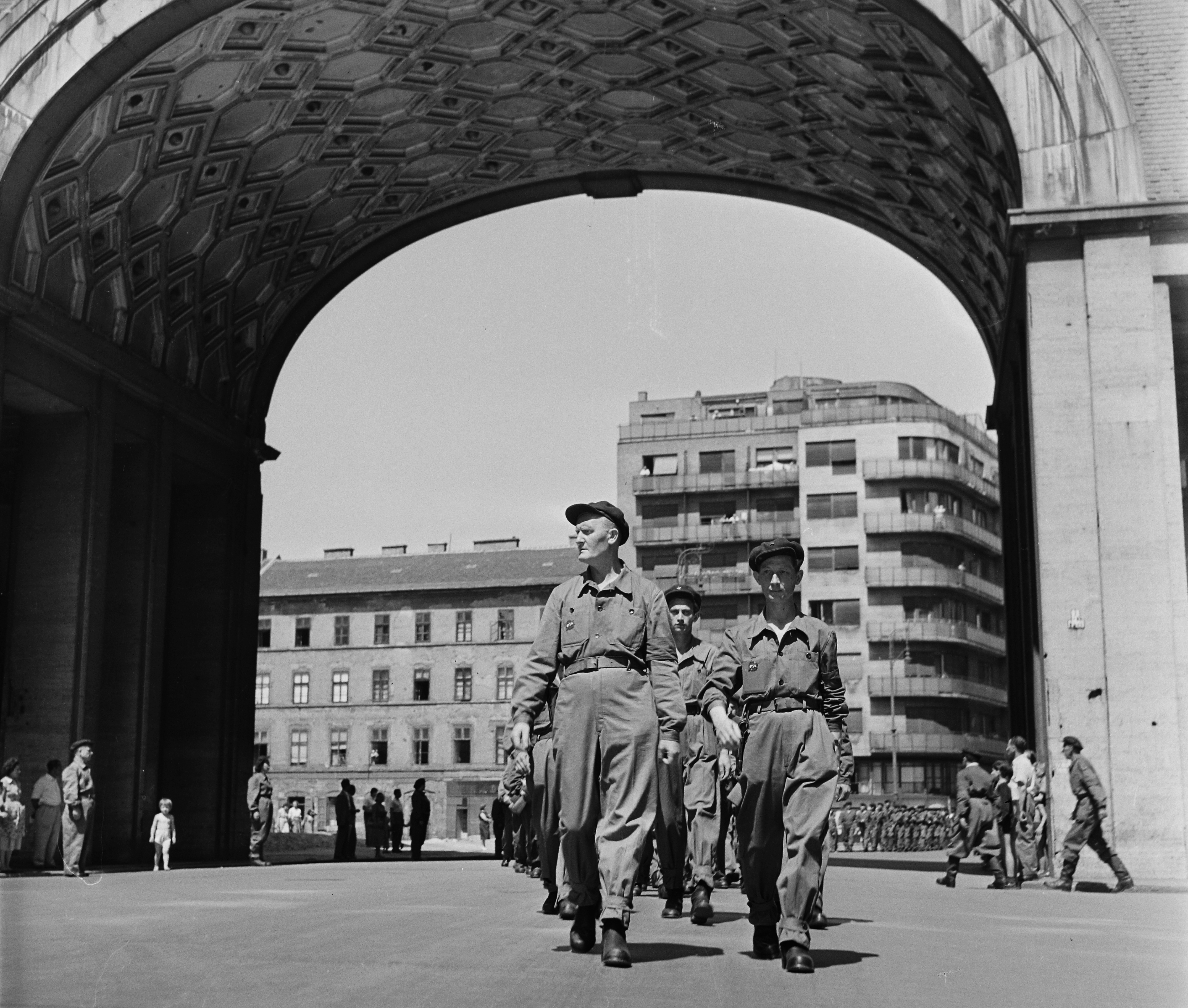 BUDAPEST VII. Madách Imre tér a Rumbach Sebestyén utca felé nézve. A VII. kerületi munkásőrség zászlóavató ün­nepsége.